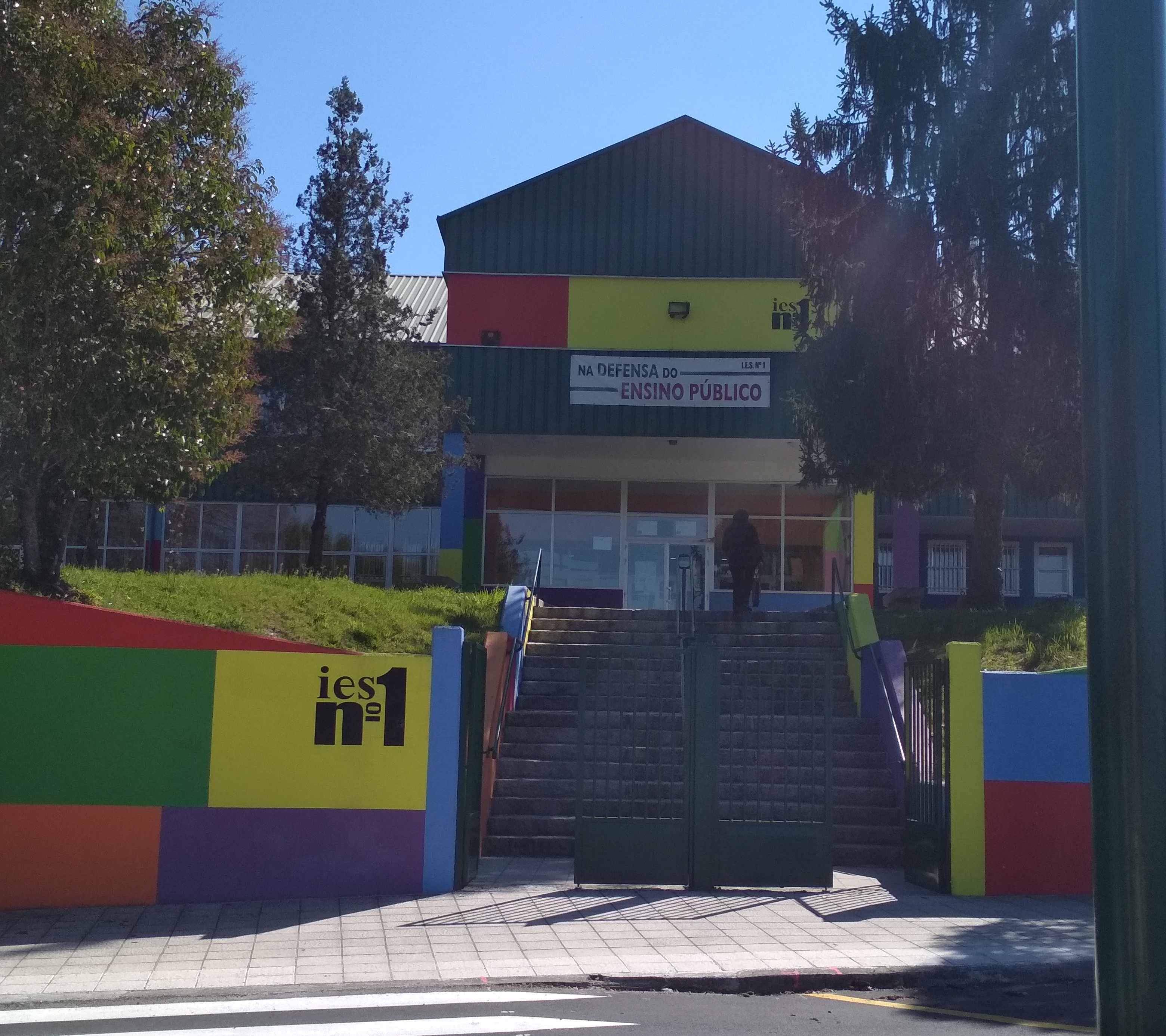 Fachada do instituto no 2019